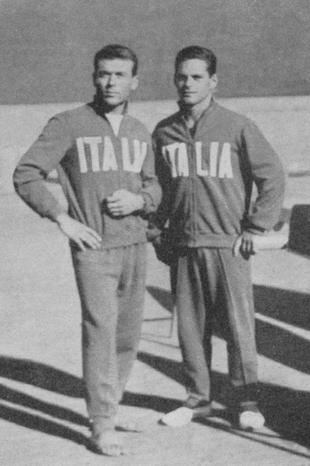 Francesco La Macchia and Aldo Dezi 1960